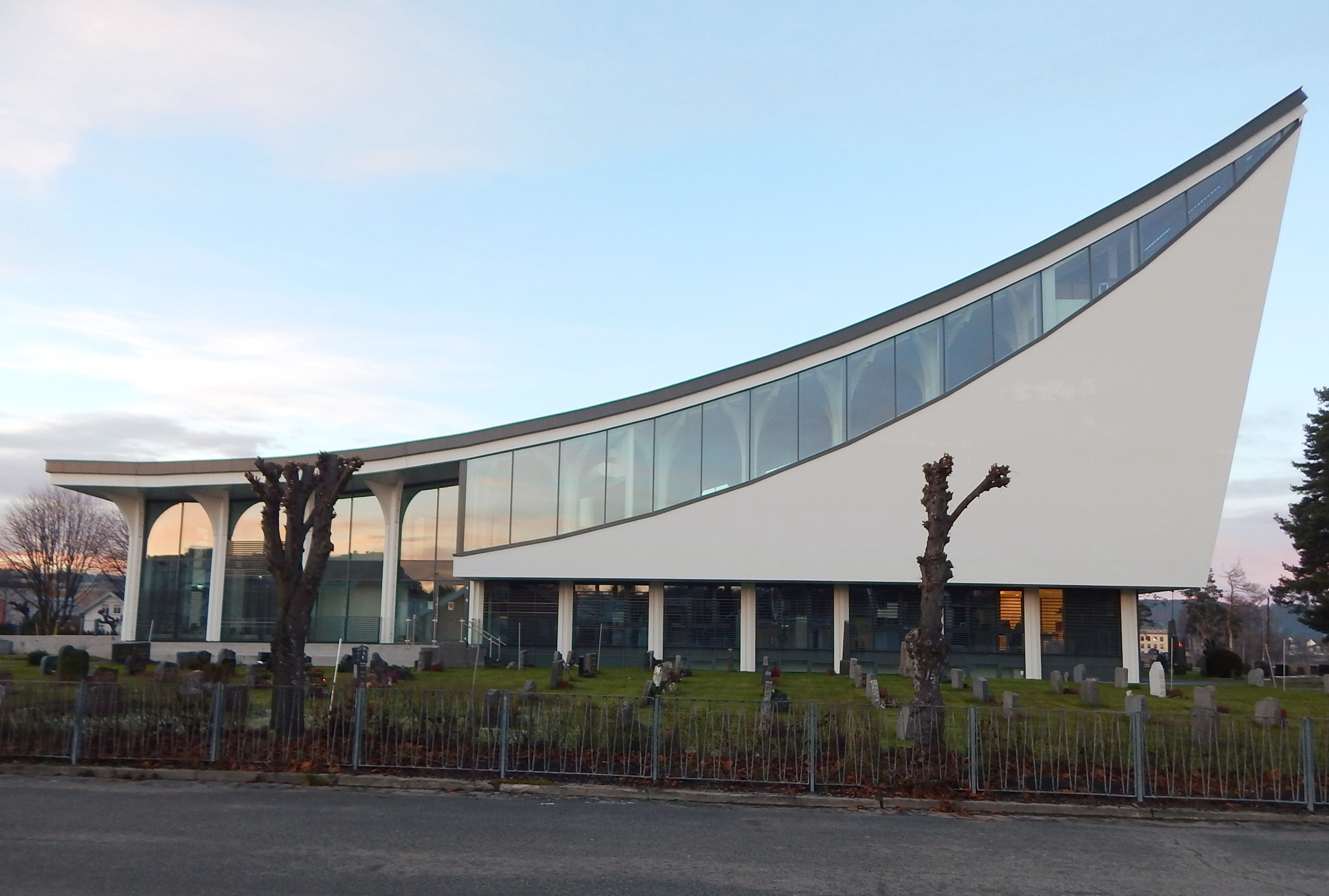 Hønefoss kirke, november 2017